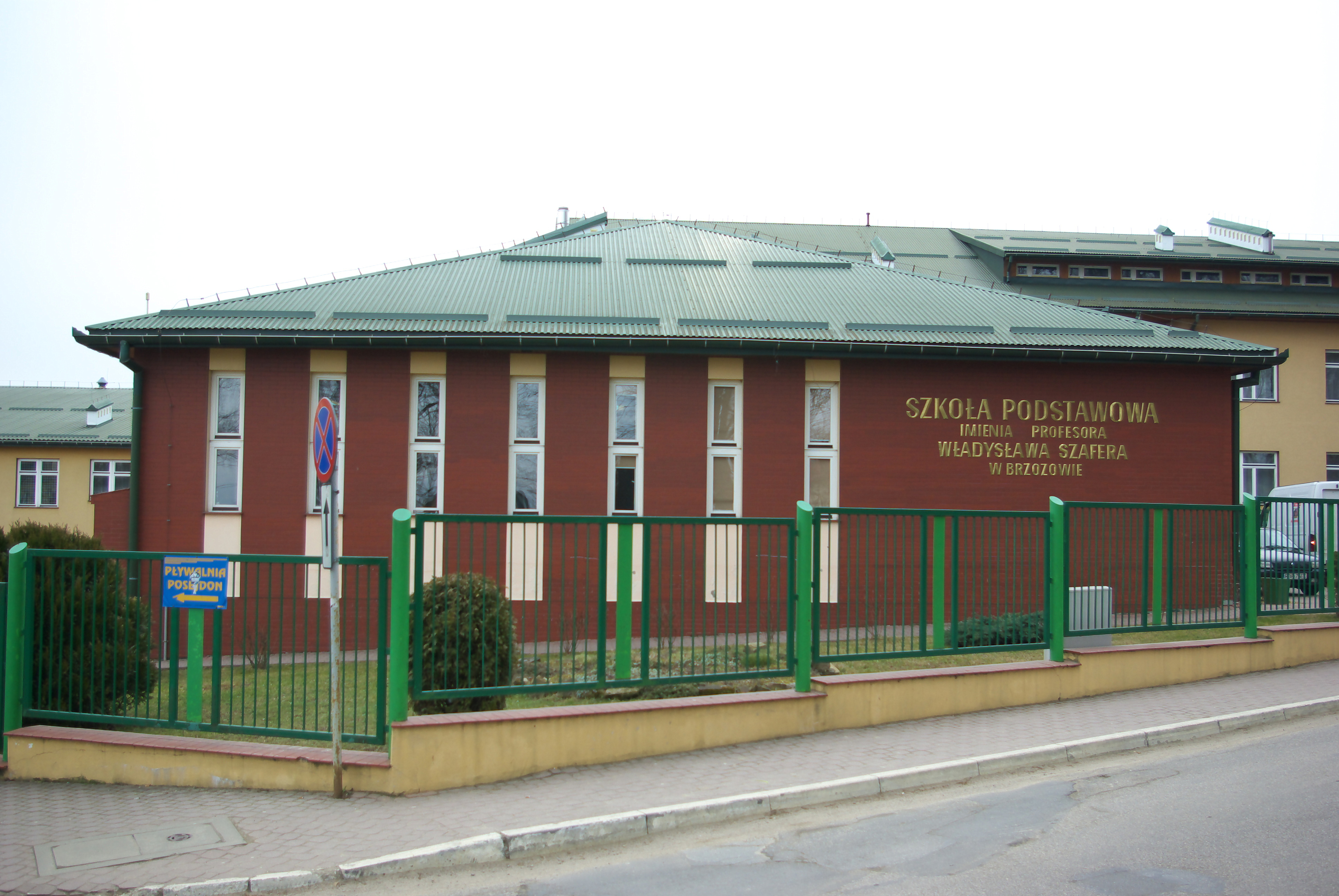 Szkoła Podstawowa nr 1 im. prof. Władysława Szafera w Brzozowie. Ulica Parkowa 5.